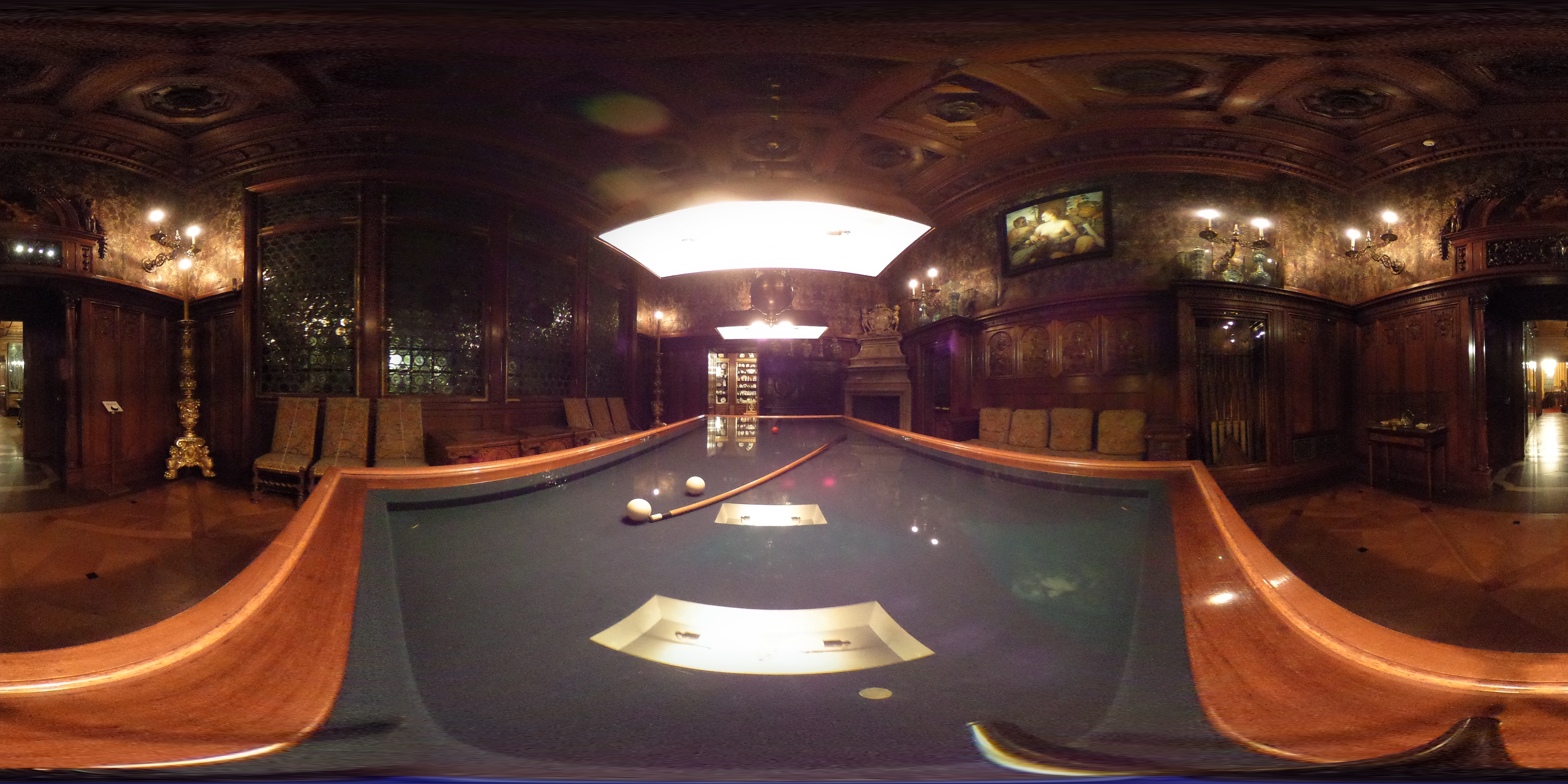 Interiörbild på Hallwylska.